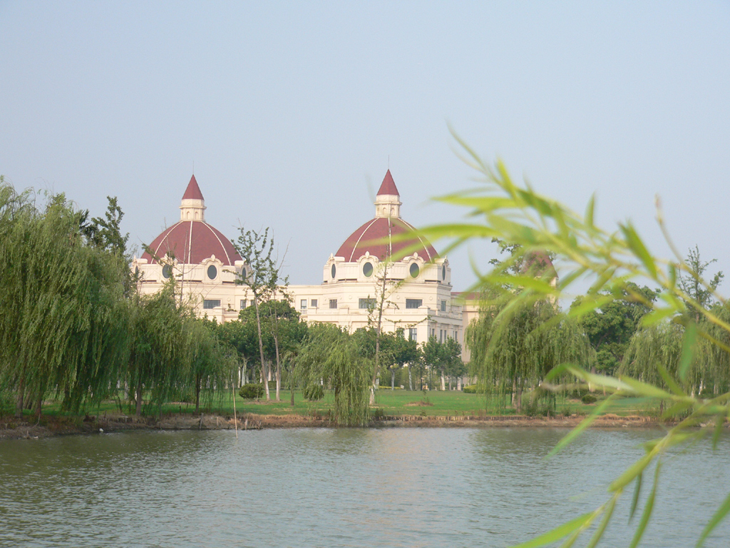 Institut der Shanghai International Studies University